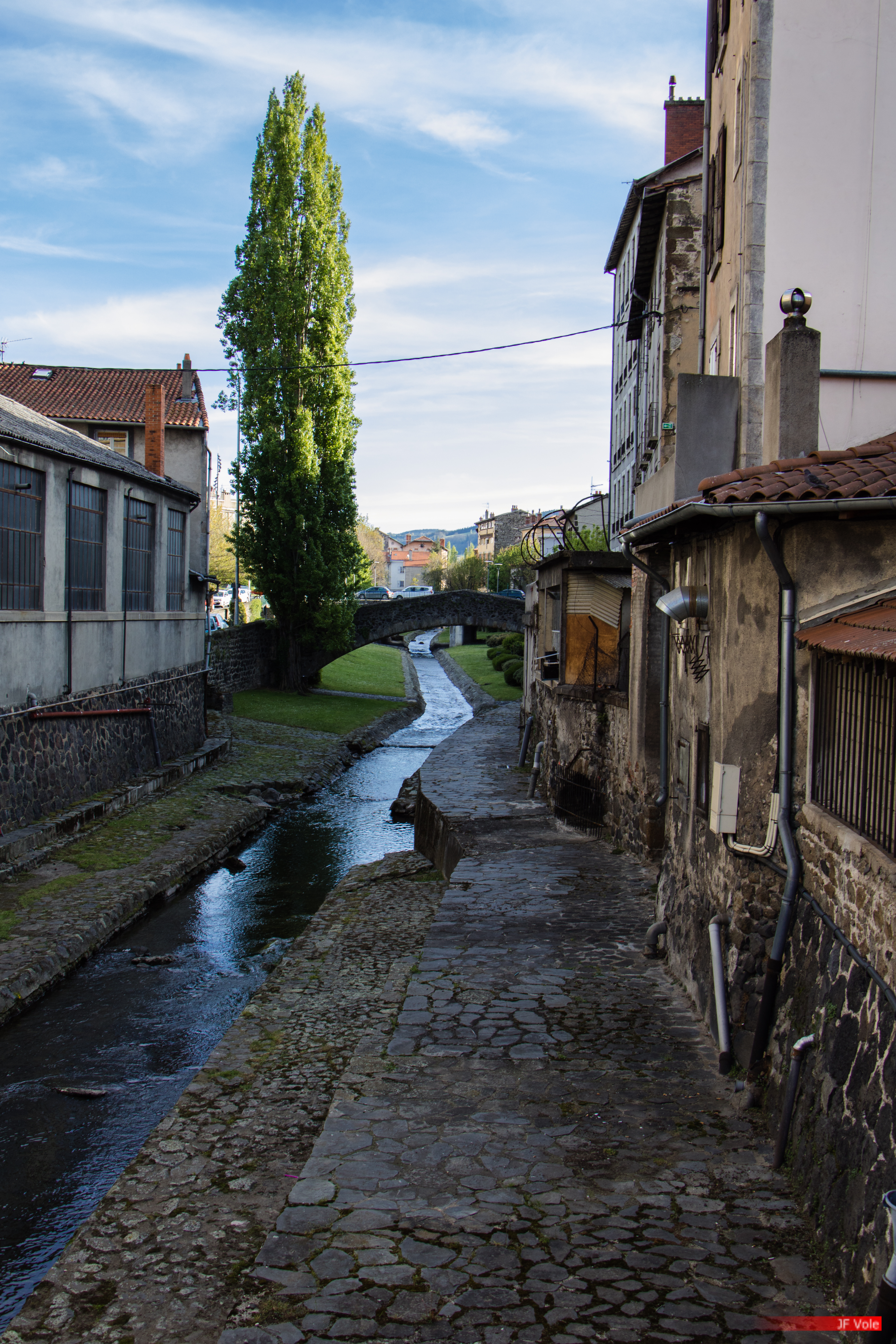 Le Dolaizon au Puy-en-Velay